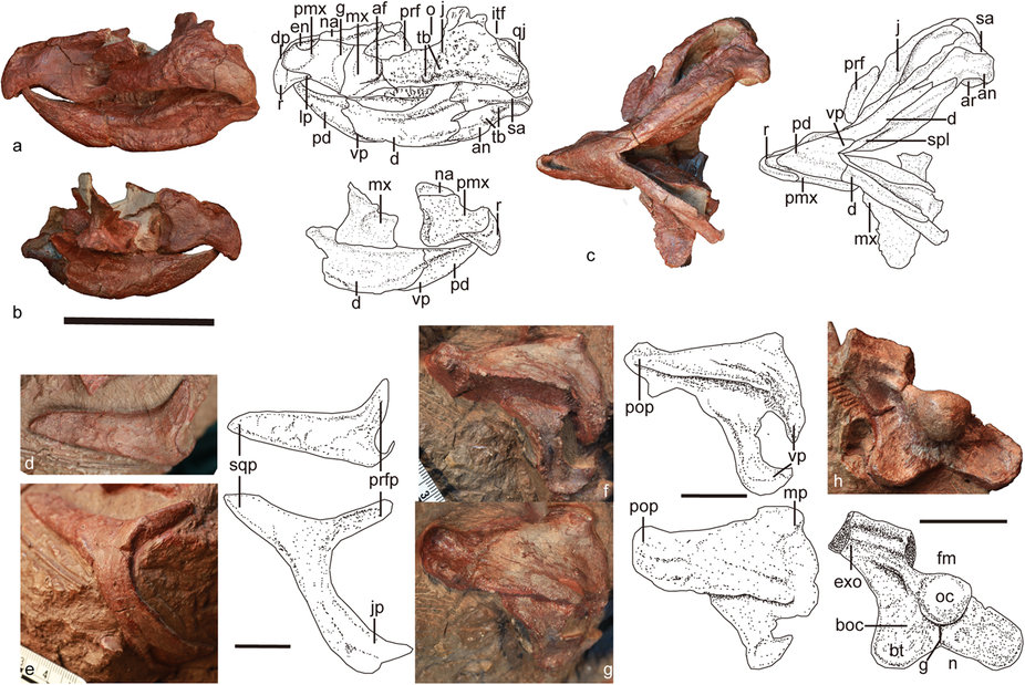 Cranial remains of Mosaiceratops azumai, gen. et sp. nov. hotograph and interpretive drawing of skull in left lateral (a), right lateral (b) and ventral (c) views; right postorbital in dorsal (d) and anterolateral (e) views; left squamosal in lateral (f) and laterodorsal (g) views; partial braincase in occipital (h) view. Scale bars in a–c, 5 cm, in d–h, 2 cm. Abbreviations: af, antorbital fossa; an, angular; ar, articular; boc, basioccipital; bt, basioccipital tubera; d, dentary; dp, dorsal process of rostral; en, external naris; exo, exoccipital; fm, foramen magnum; g, groove; itf, infratemporal fenestra; j, jugal; jp, jugal process; lp, lateral process; mp, medial process; mx, maxilla; n, notch; na, nasal; o, orbit; oc, occipital condyle; pd, predentary; pmx, premaxilla; pop, postorbital process; prf, prefrontal; prfp, prefrontal process; qj, quadratojugal; r, rostral bone; sa, surangular; spl, splenial; sqp, squamosal process; tb, tubercle; vp, ventral process.